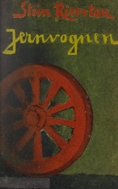 Omslaget til Jernvognen, utgitt Aschehoug 1909.